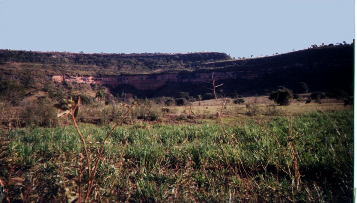 Serra da Boa Vista, situada a 40 km da cidade do Prata (MG).